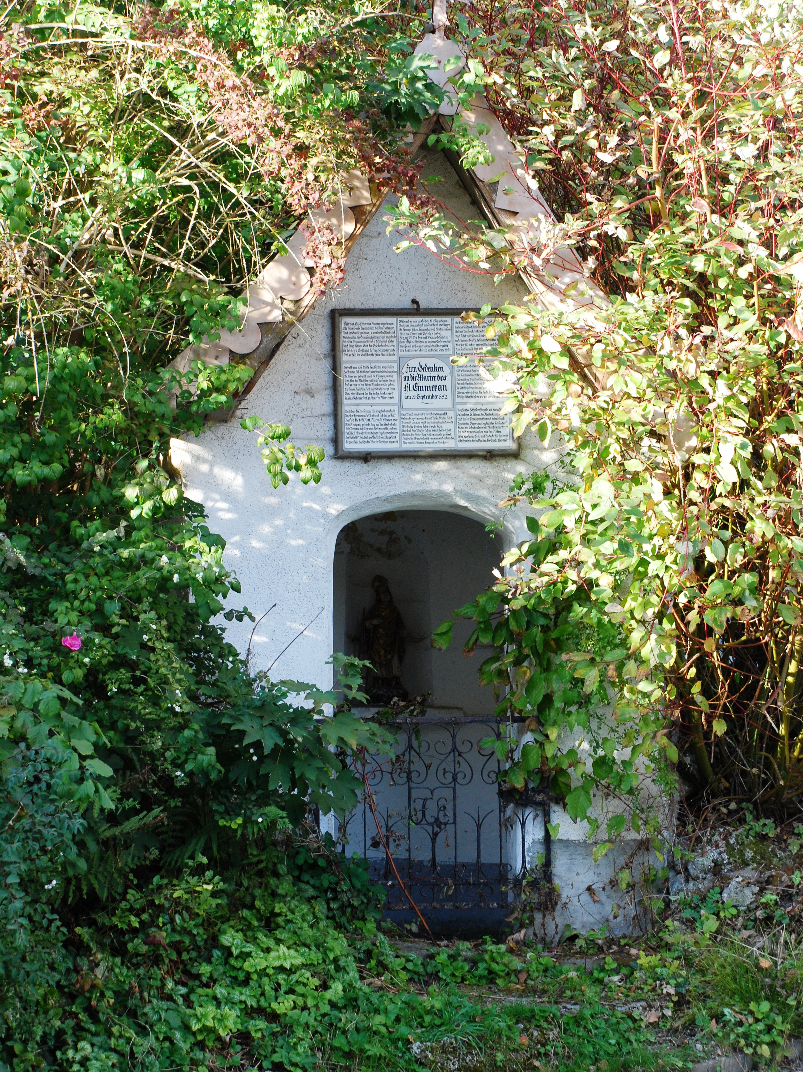 Sogenannte Brunnenkapelle nördlich der Kirche St. Emmeram in Kleinhelfendorf, Ortsteil von Aying, Landkreis München, Regierungsbezirk Oberbayern, Bayern. Als Baudenkmal unter Aktennummer D-1-84-137-43 in der Bayerischen Denkmalliste aufgeführt. Bild gemäß den Vorgaben zur Panoramafreiheit von öffentlichem Verkehrsgrund aus aufgenommen.